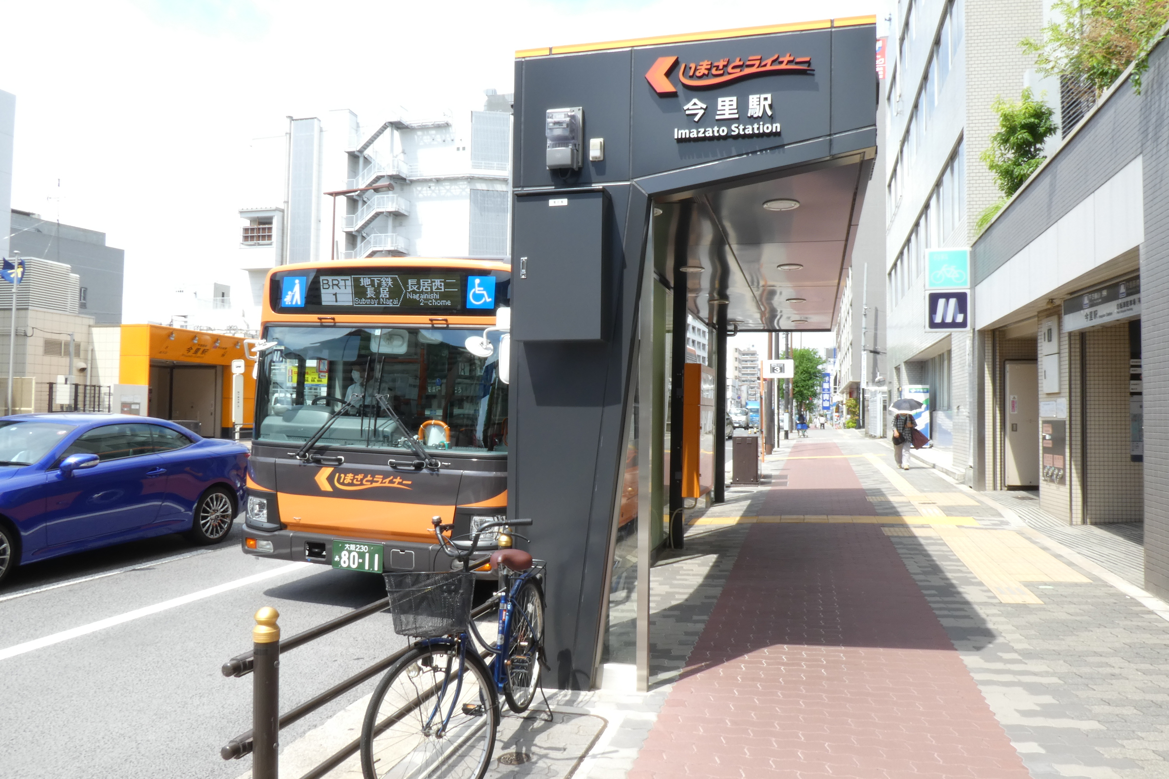 今里駅(北)停留所に停車中のいまざとライナー